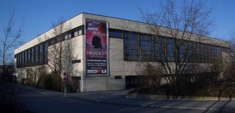 Freiheitshalle in Hof am Volksfestplatz (Großes Haus der Freiheitshalle, Zustand 1974–2009)